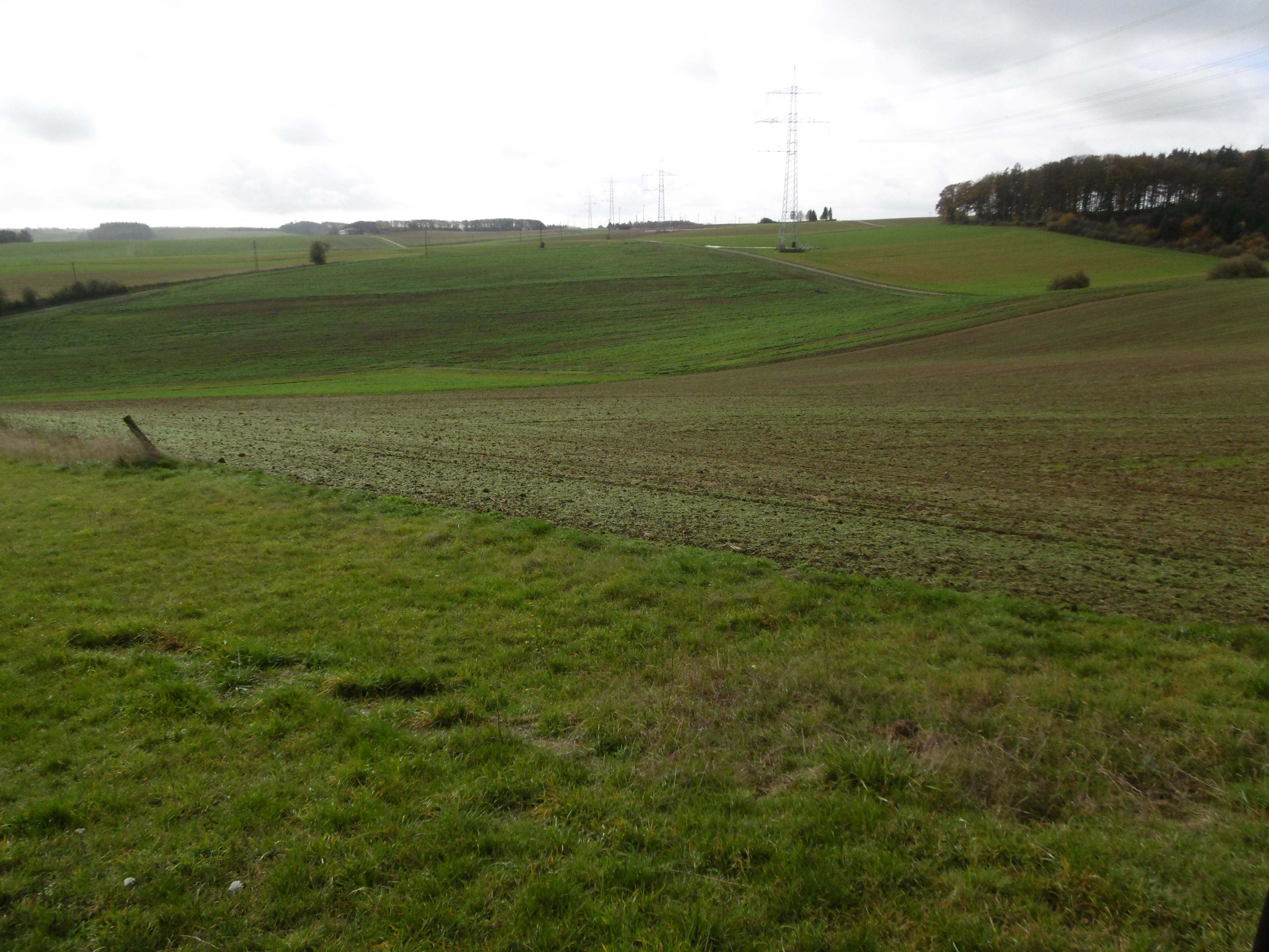 Landschaftsschutzgebiet Rotes Land westlich vom Naturschutzgebiet Udorfer Mühle